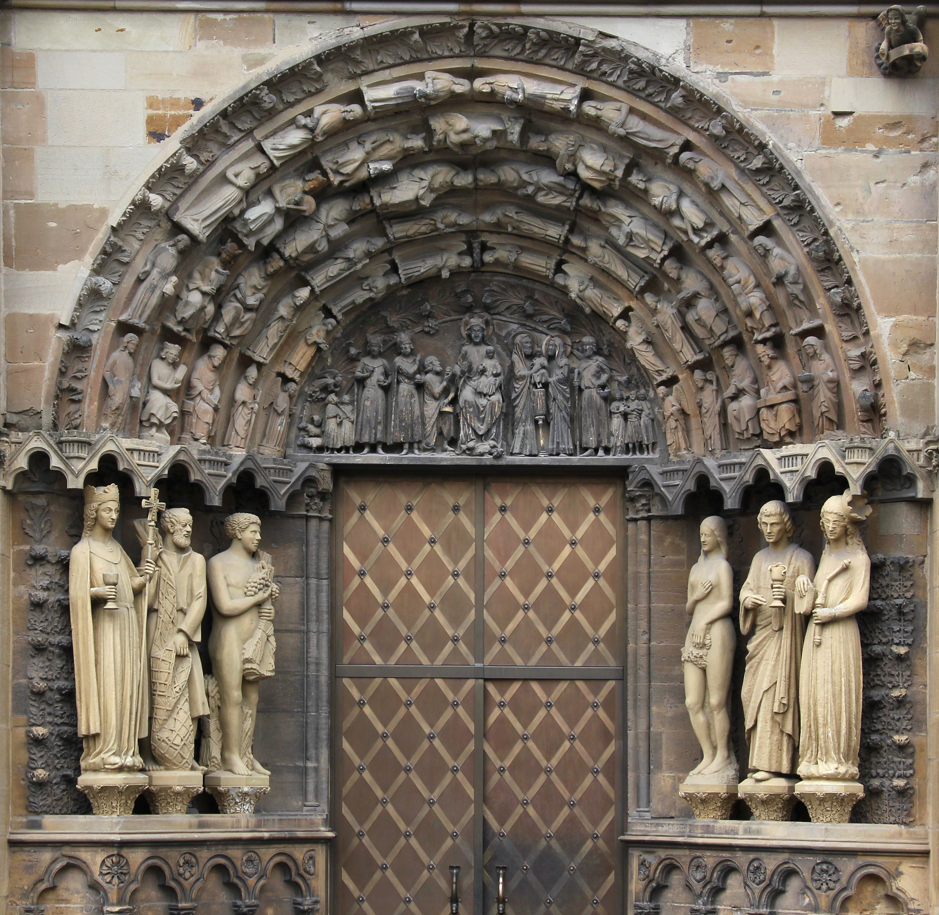 Westportal der Liebfrauenkirche in Trier